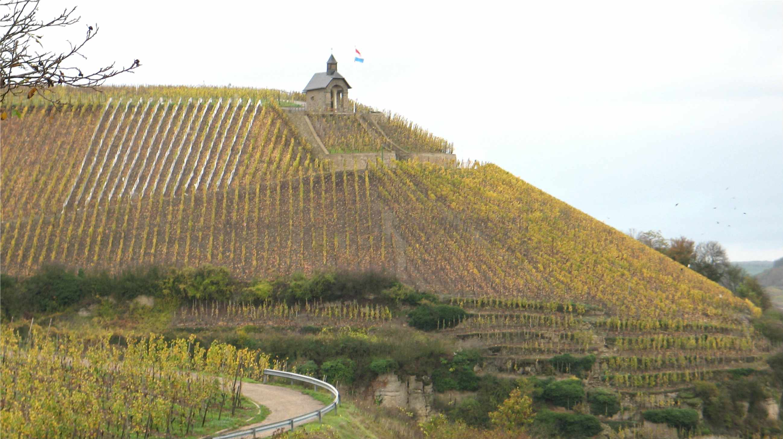 La chapelle au sommet du Wormer Koeppchen à Wormeldange (Luxembourg)